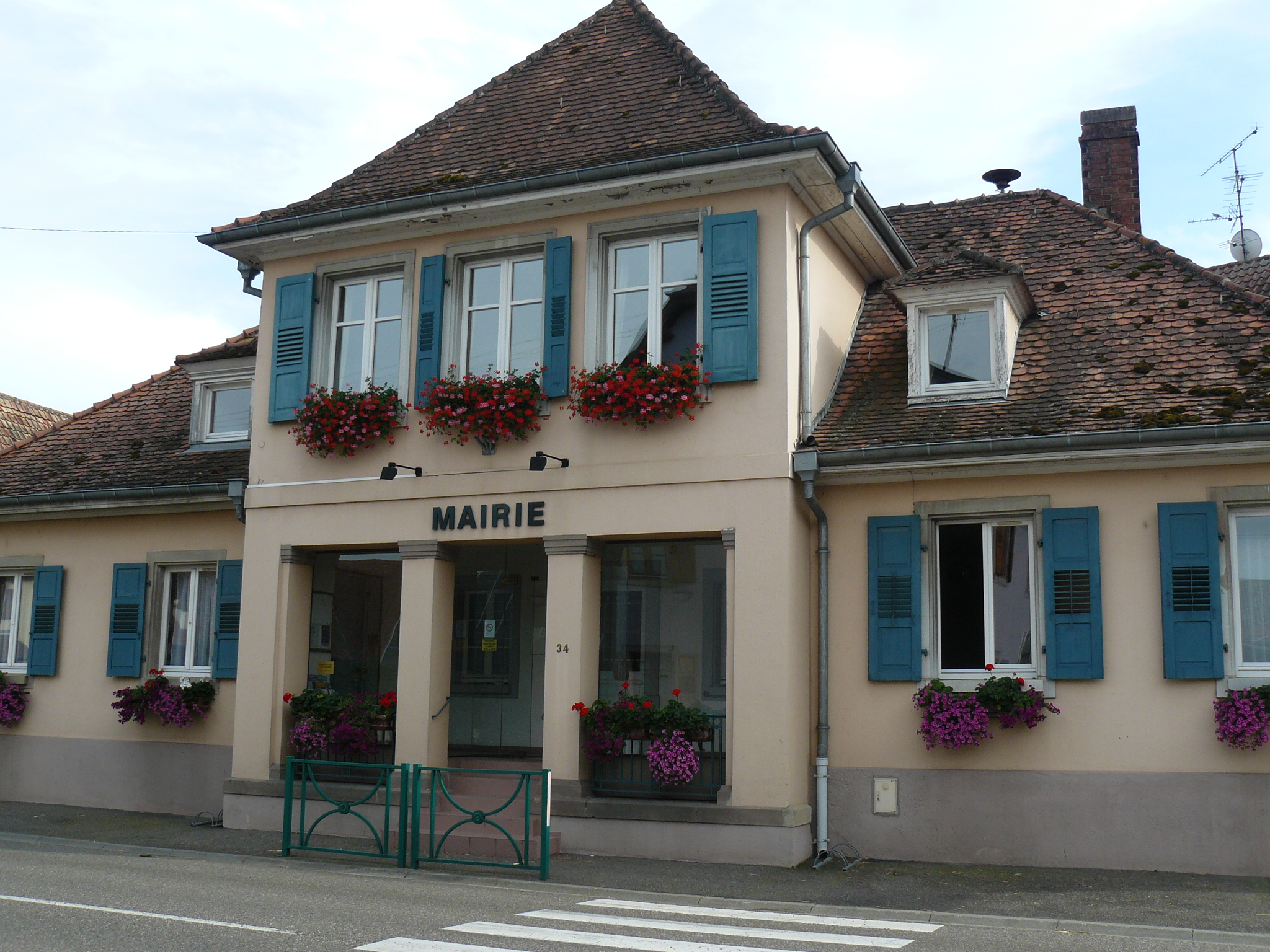 Mairie de Muntzenheim